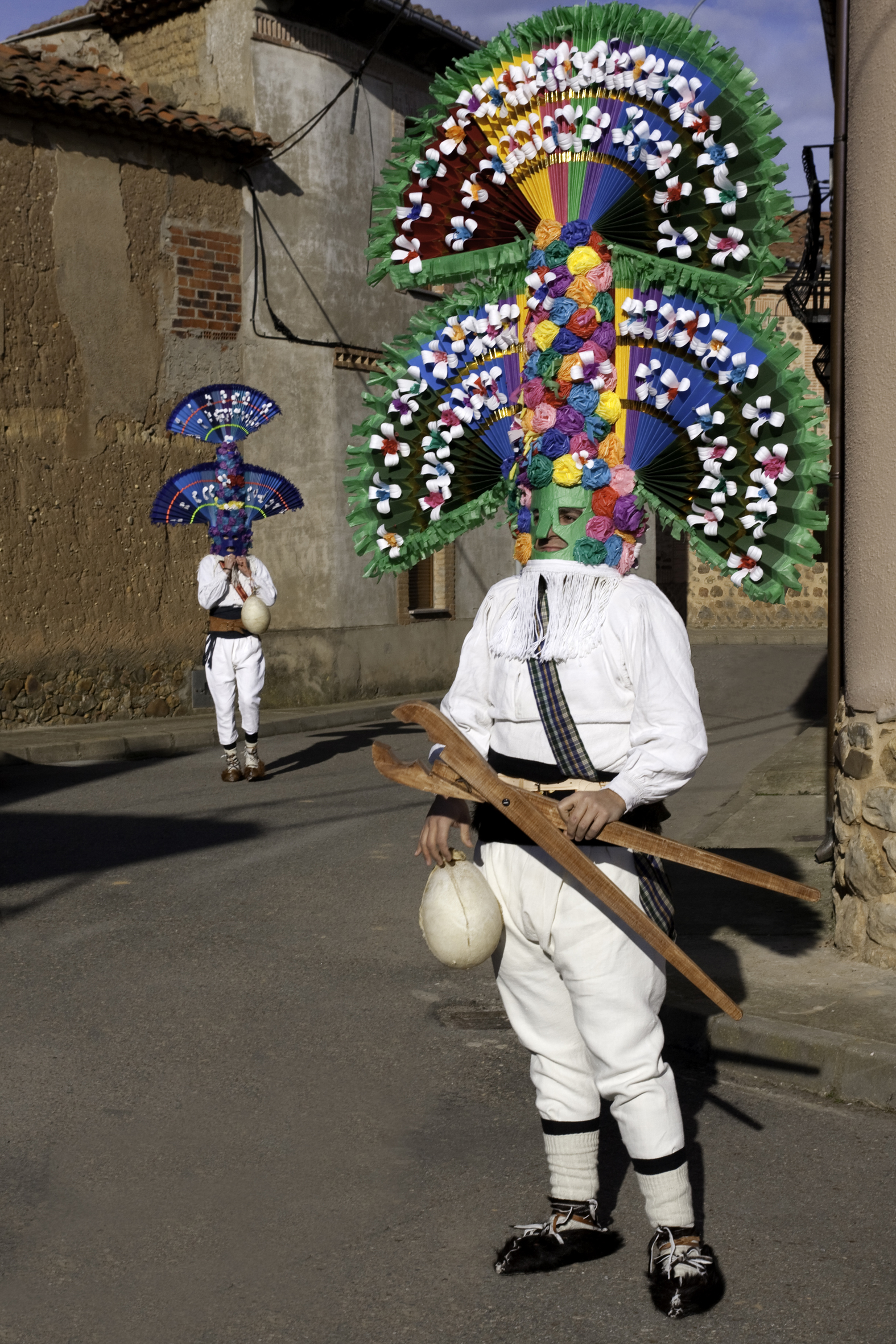 Antruejo de Llamas de la Ribera, León, España. Febrero de 2010. This is a photography of a Folklore festival in Spain (Wikidata id Q21855013).